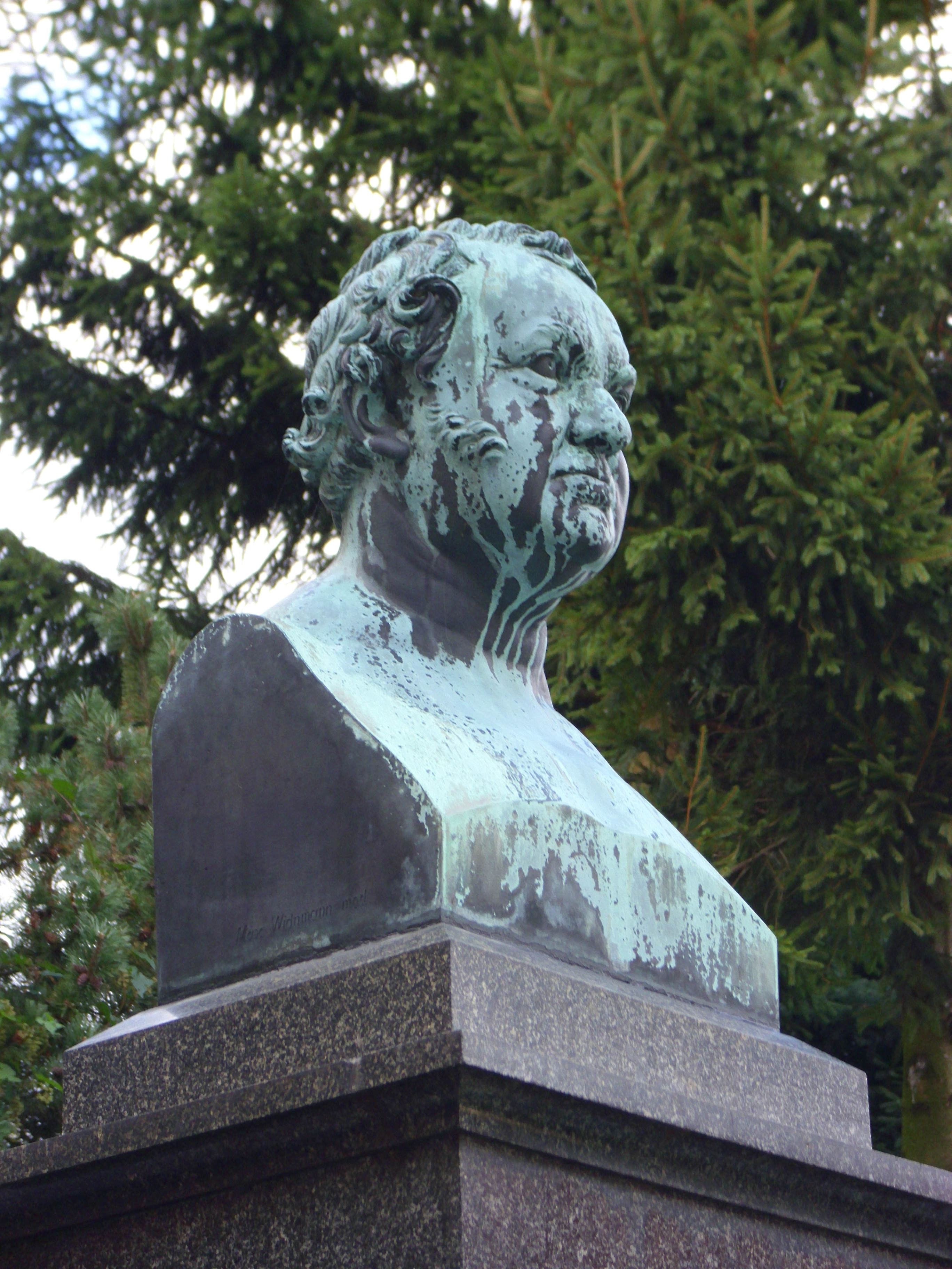 Gotthilf Heinrich von Schubert Denkmal Hinrich-Wichern-Straße Hohenstein-Ernstthal 03